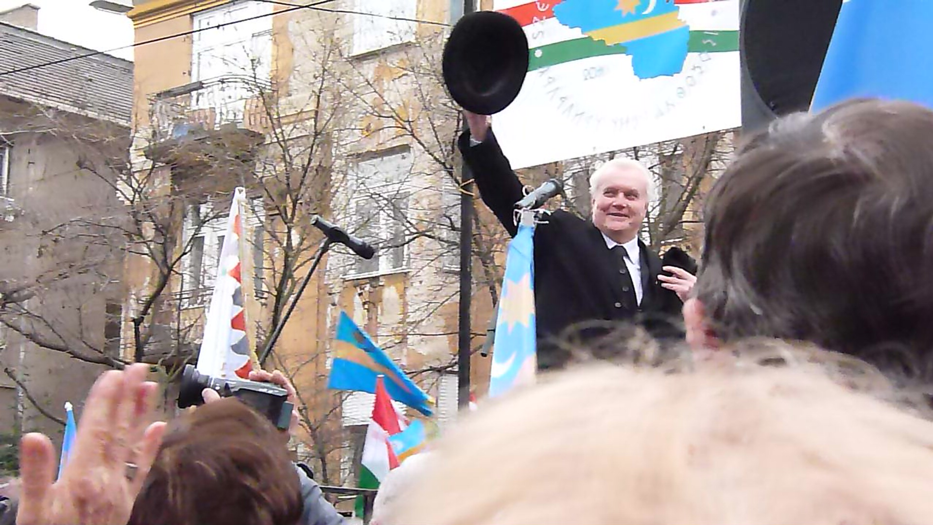 Live on the 10th of March, 2013. Budapest, in front of the Romanian Embassy. Csurka László. A felvétel 2013. Március 10 –én, a Székely Szabadság Napján készült Budapesten, a Román Nagykövetség előtt. György-Mózes Árpád a Székelyföldért Társaság elnöke. ©© Derzsi Elekes Andor, Budapest, 2013, You are authorised to use these photos and vids under Creative Commons – even for commercial, for profit purposes. Photos must be attributed to Derzsi Elekes Andor. All of the photos and vids in the Metapolisz DVD line are under Creative Commons and can be used even for commercial – for profit – purposes. Recommended Citation Derzsi Elekes Andor: Metapolisz DVD line